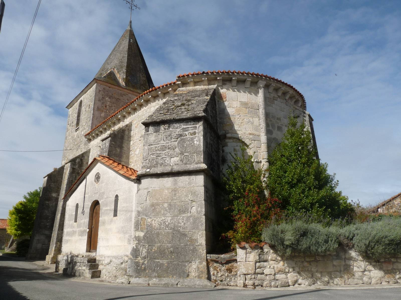 église de St-Laurent-de-Belzagot, Charente, France